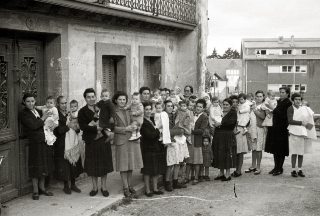 Título original: Grupo de mujeres recibiendo ropa y víveres (5/8) Localización: Guipúzcoa